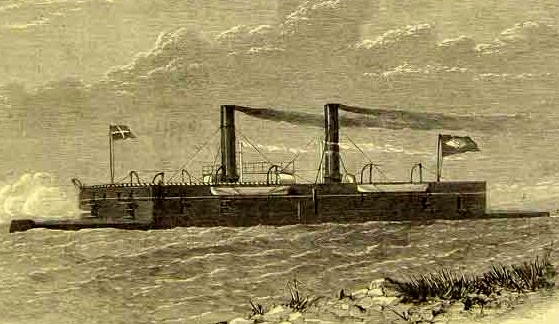 Encorazado Colombo (1865)